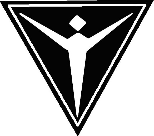 Emblen Flugmotorenwerke Ostmark